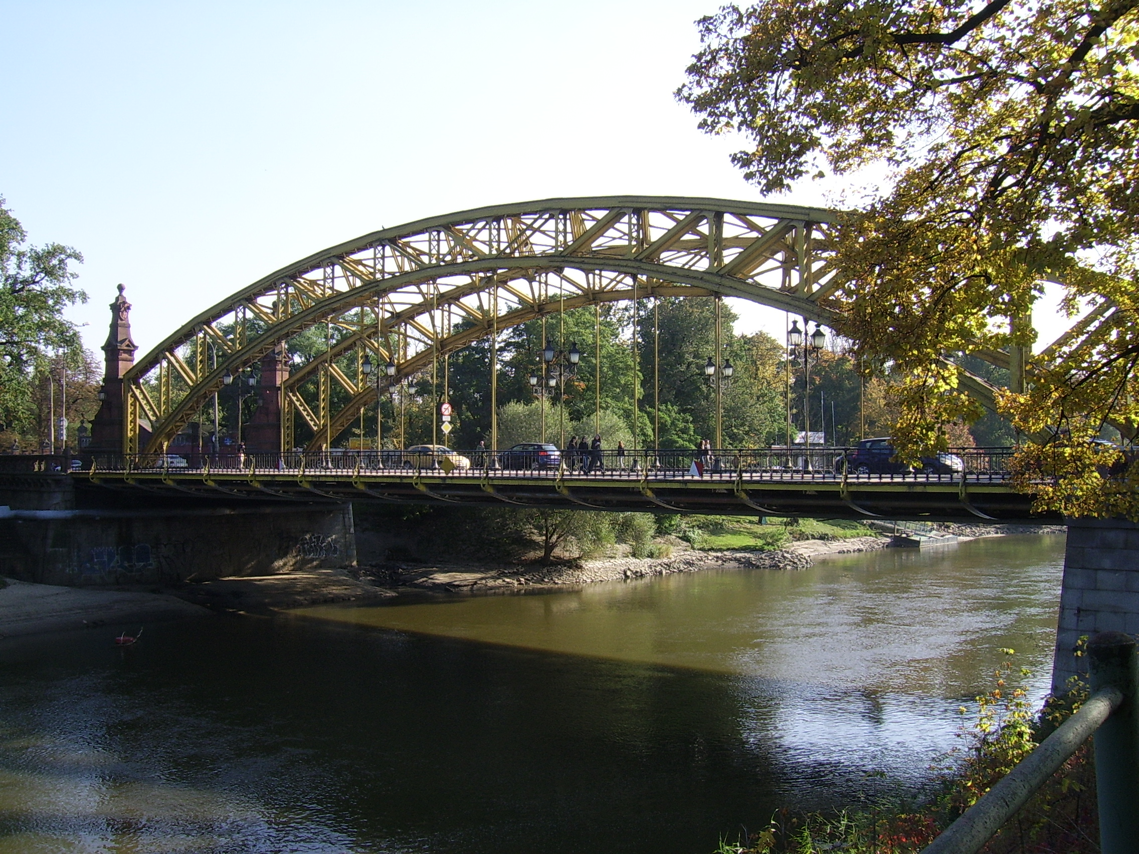 Zwierzyniecki